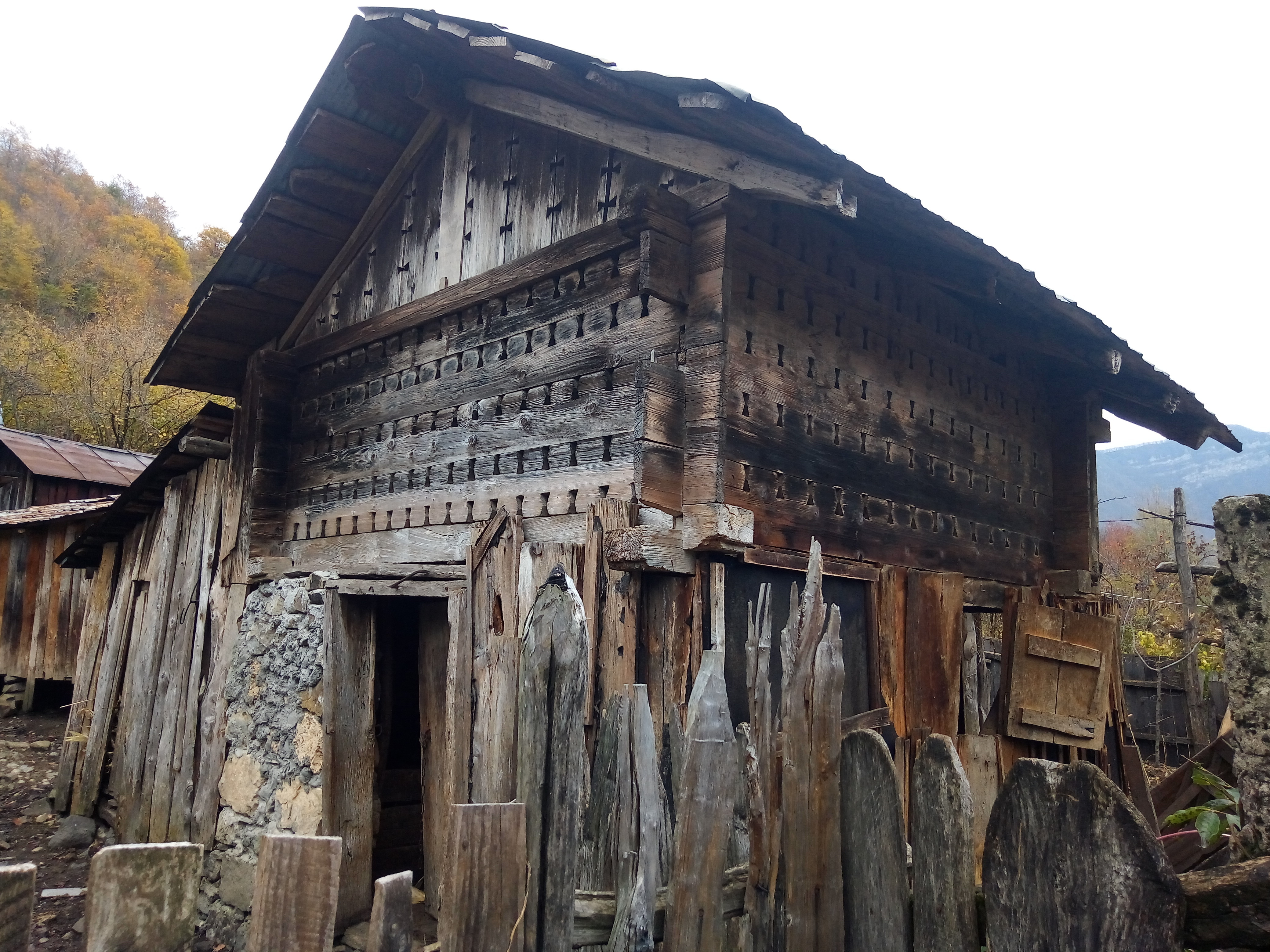 Хранилище зерна и кукурузы